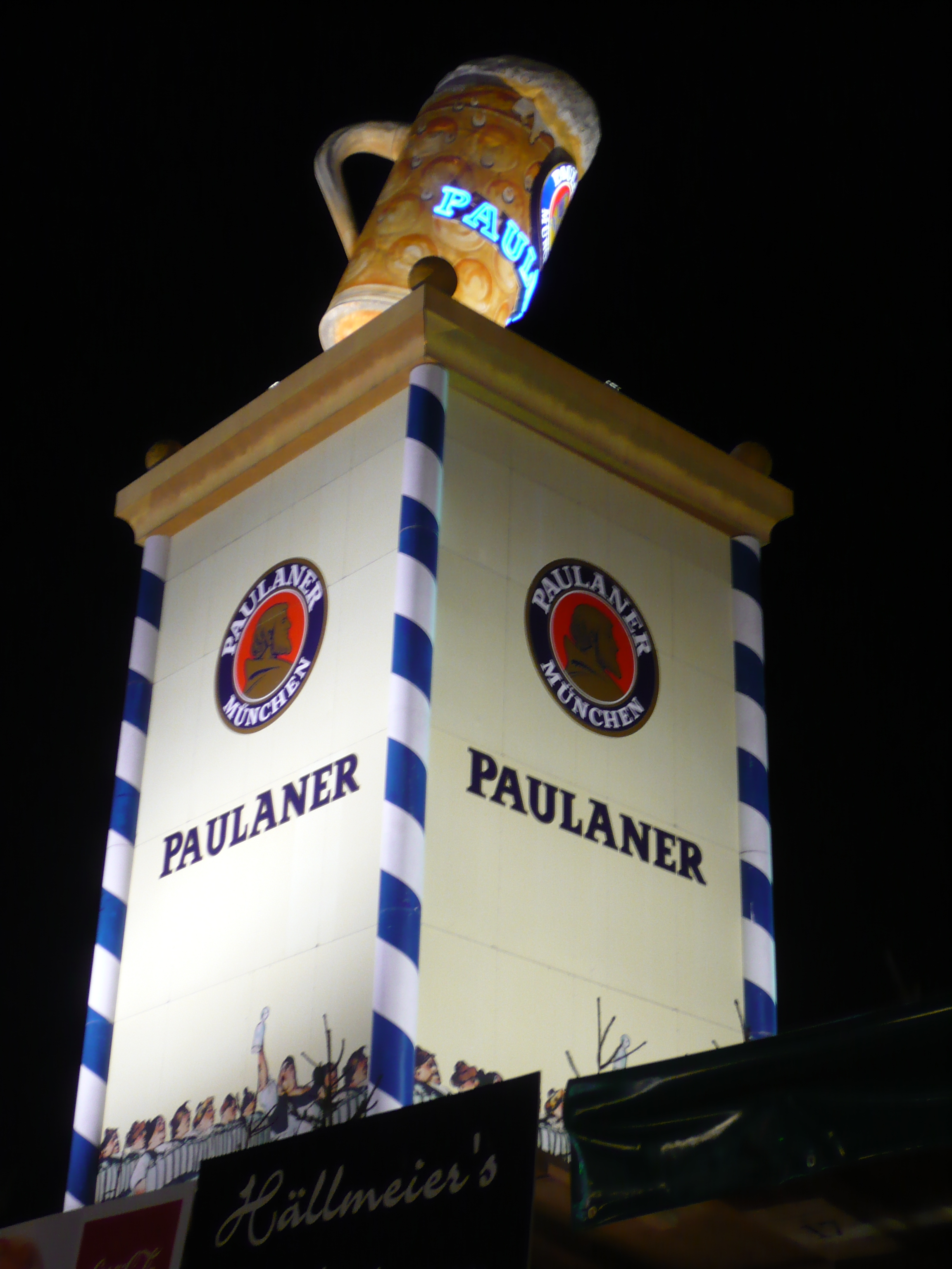 Stand della Paluaner